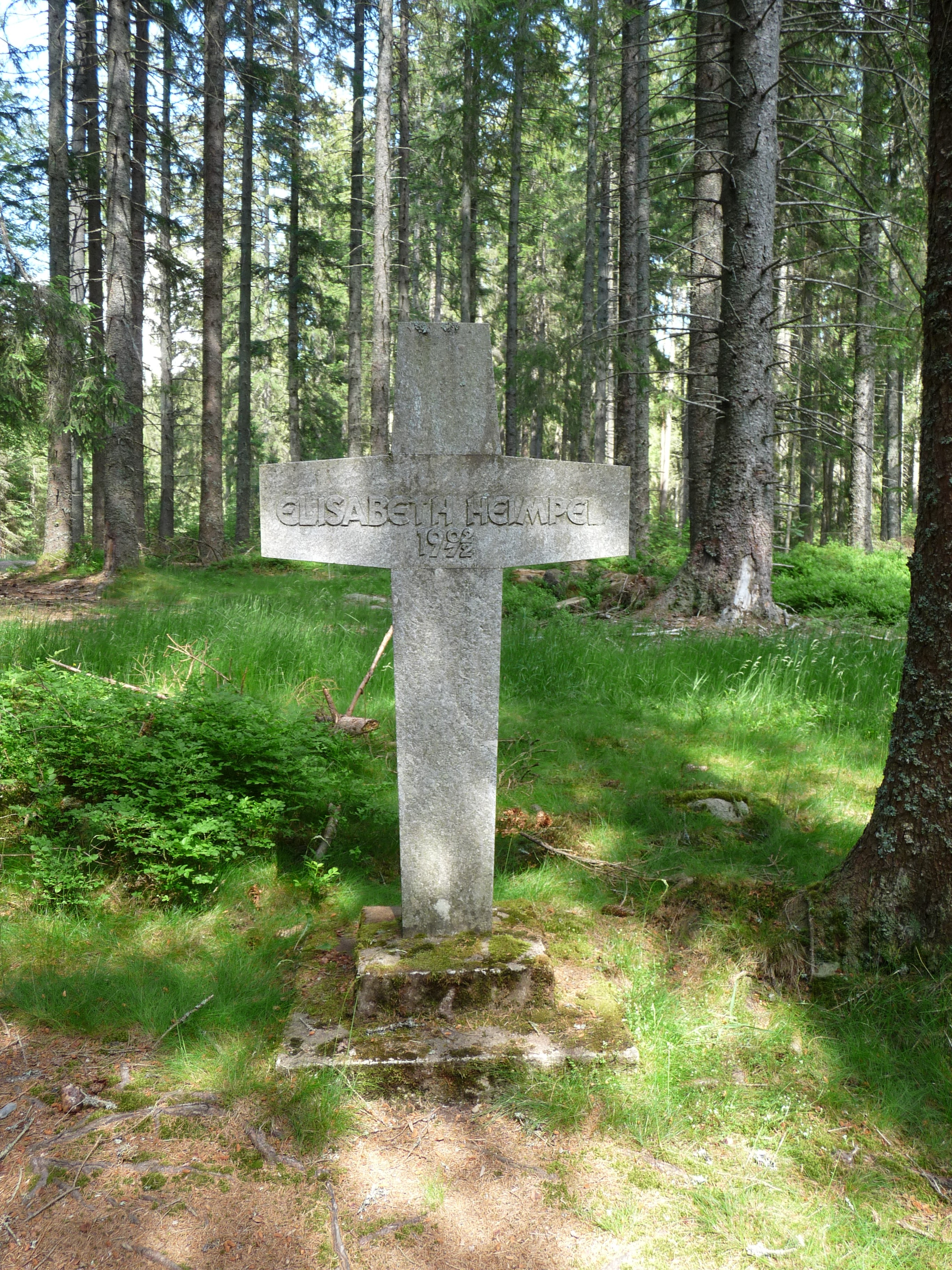 Wegkreuz am Fundort der Leiche Elisabeth Heimpels in einem Wald nahe Altglashütten